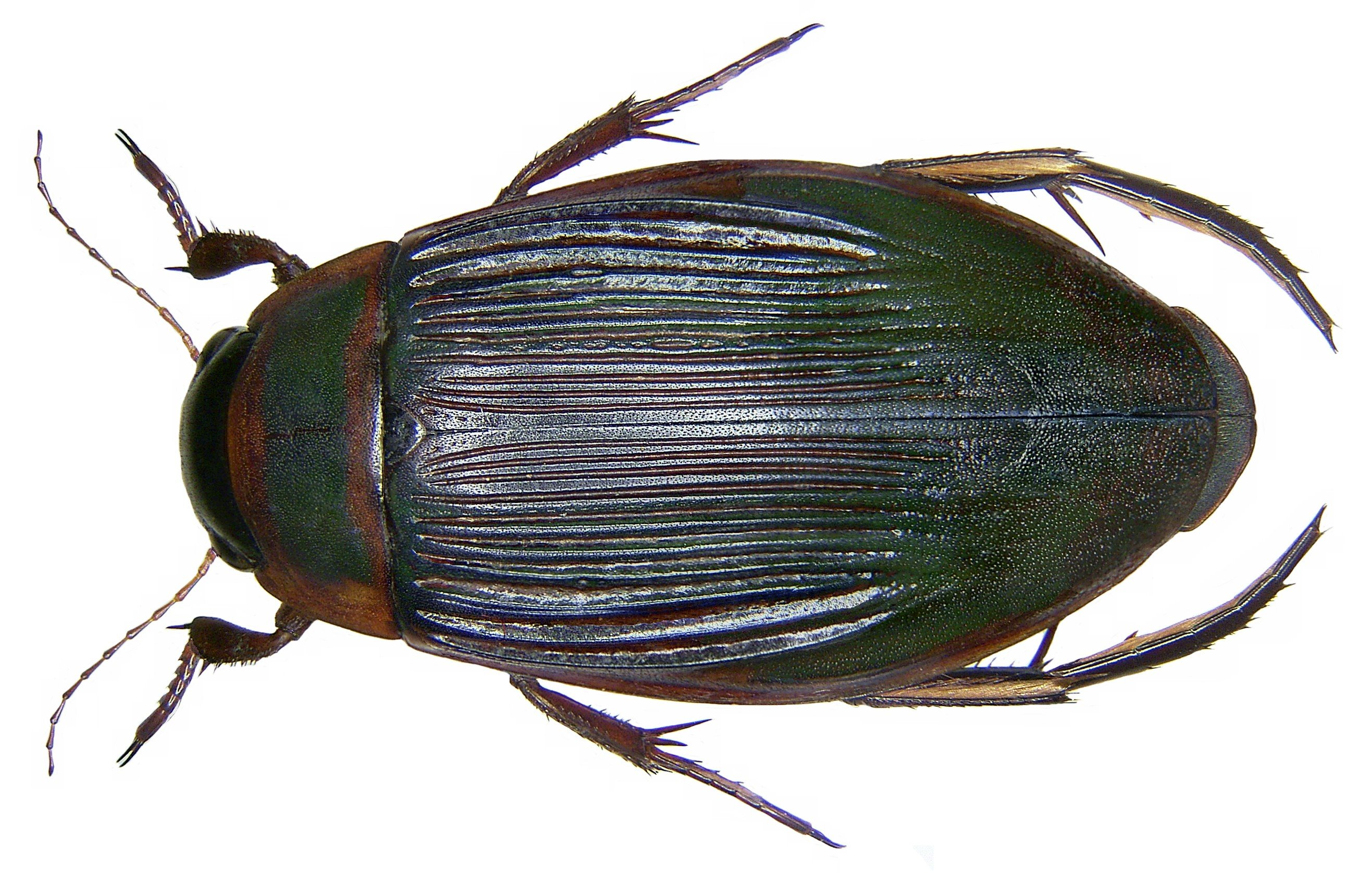 Dytiscus marginalis Linné, 1758 female Familie: Dytiscidae Grösse: 27-35 mm Verbreitung: Europa Fundort: Germania, Bayern, Oberfranken, Selbitz leg.det. U.Schmidt, 1971 Foto: U.Schmidt, 2008